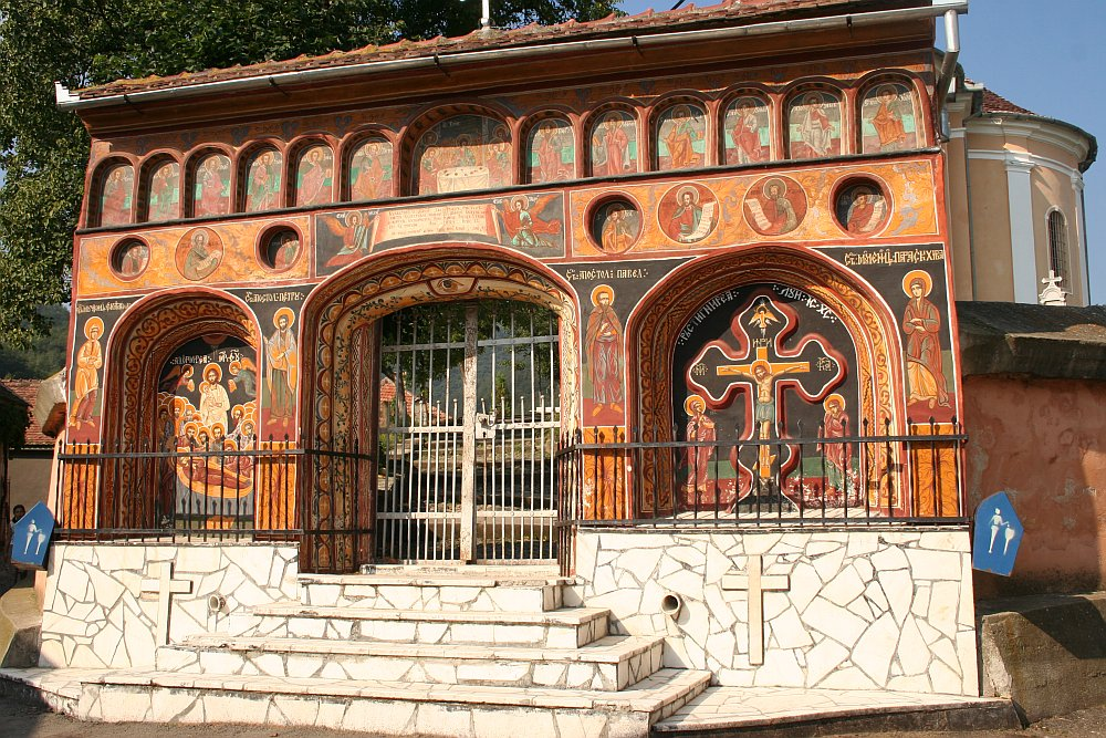 Church gate in Boiţa, Sibiu, Romania 02